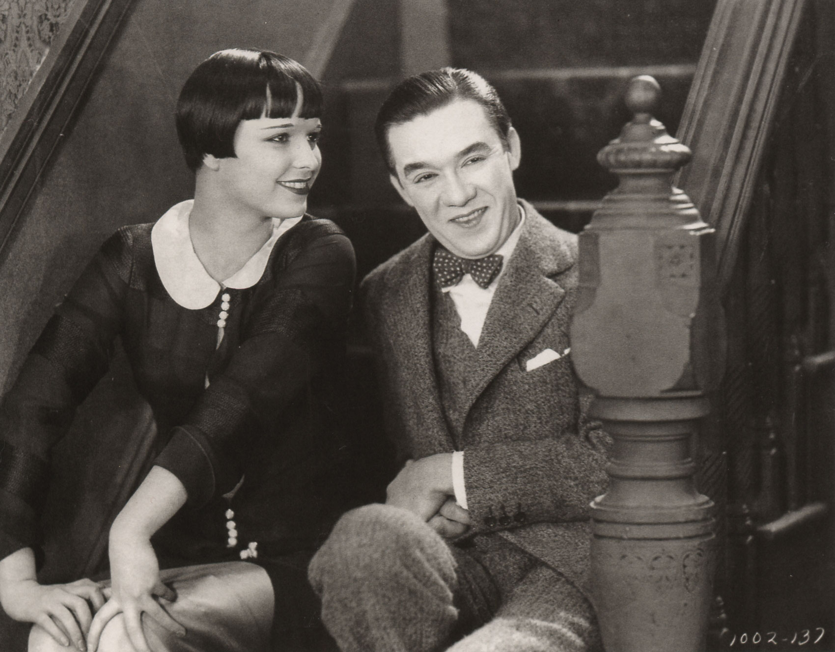 Louise Brooks en Gregory Kelly in The Show Off, een stomme film uit 1926 De film is publiek domein gezien de auteursrechten zijn verlopen. Still van .